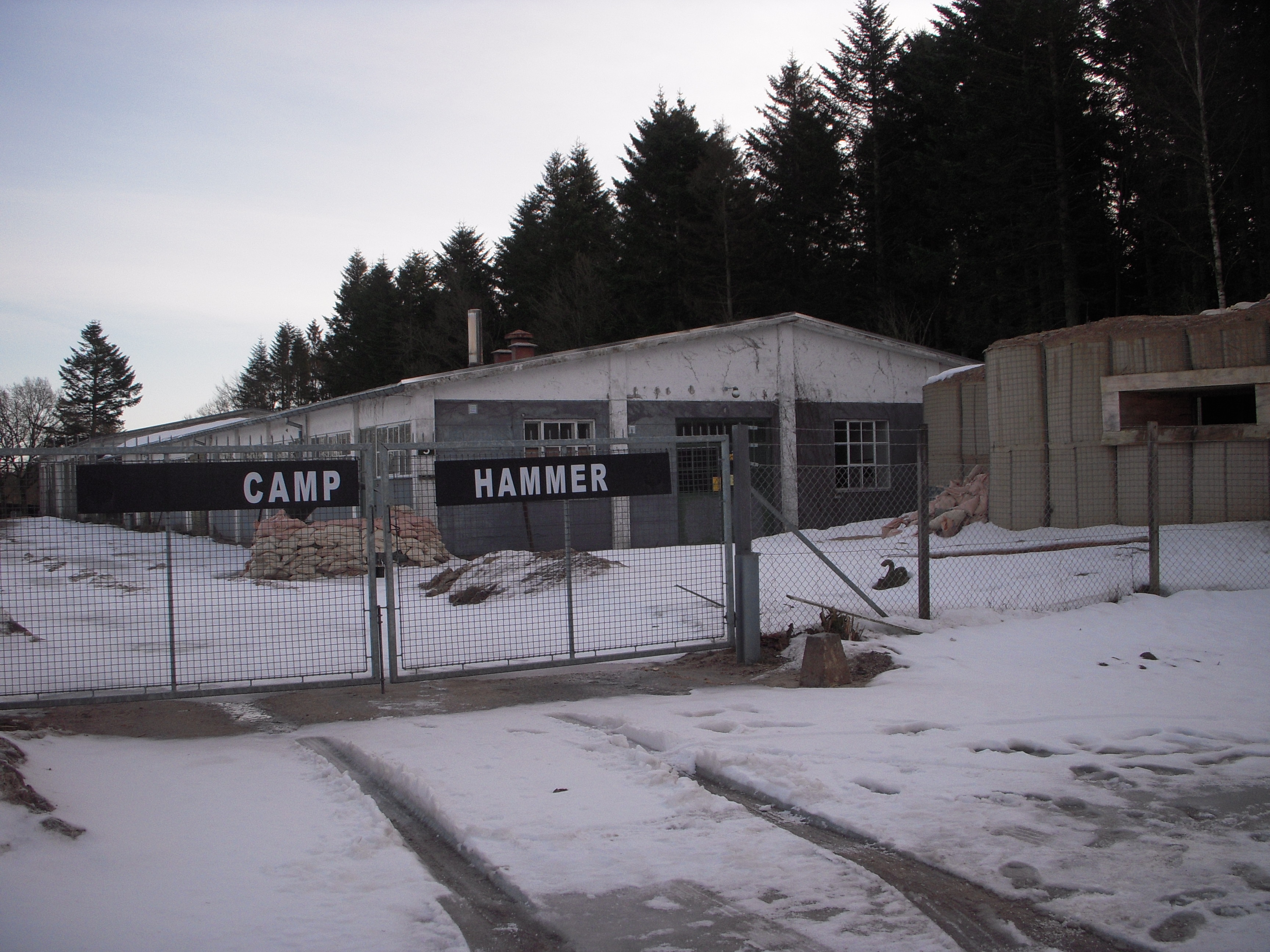 Militærdepotet 'Hammer Depot' i 2012, kort tid efter nedrivning af tjenesteboligen.